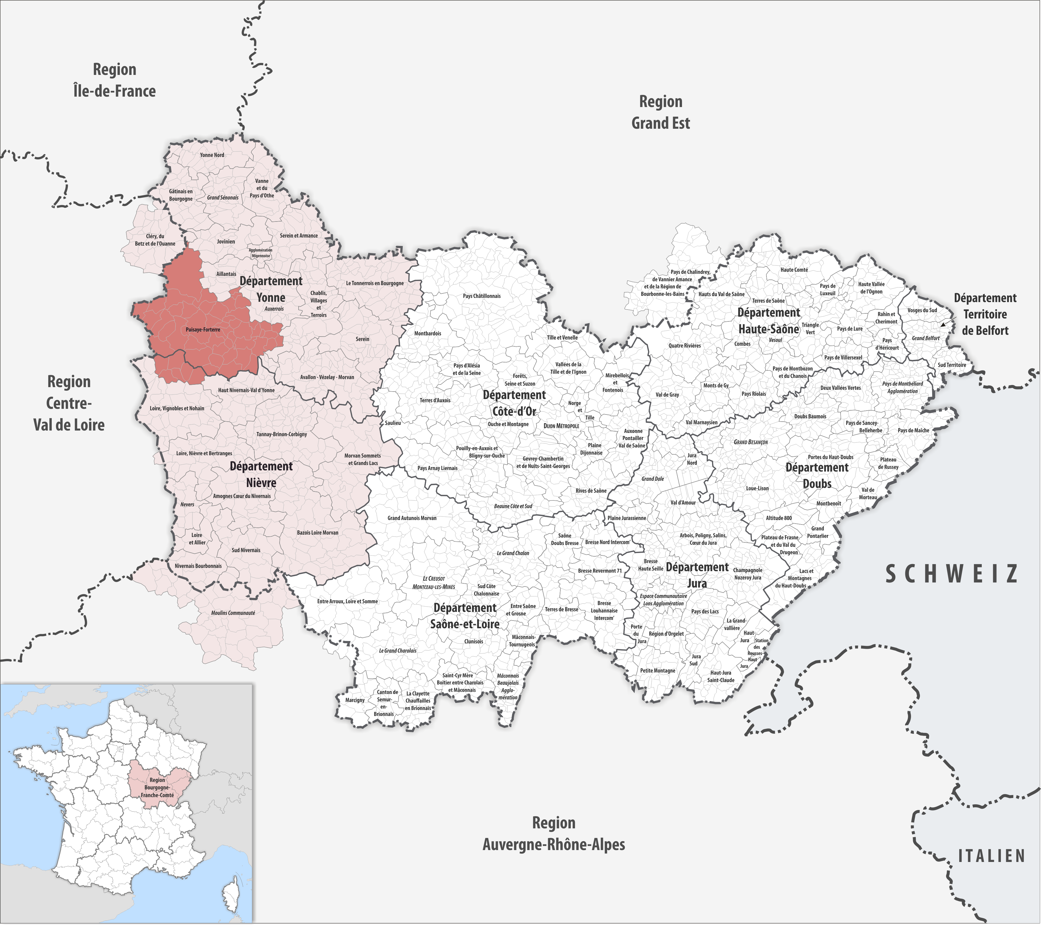 Lage des Gemeindeverbandes Puisaye-Forterre